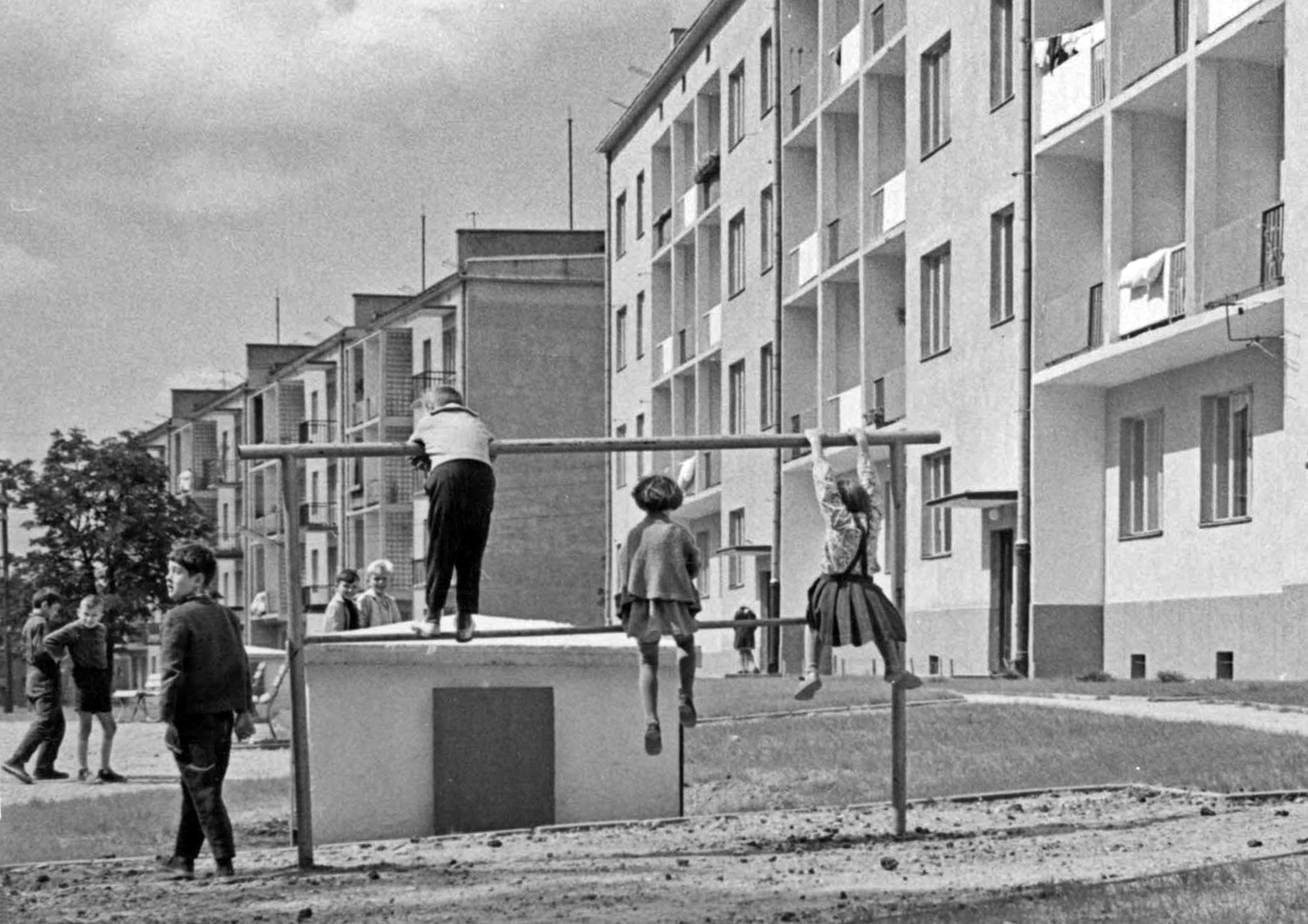 Fotografia przedstawia dzieci bawiące się na trzepaku przy blokach znajdujących się na osiedlu im. Włady Bytomskiej. Osiedle to wybudowano na Bałutach w latach 50. XX wieku, w kwartale dzisiejszych ulic: Wojska Polskiego, Obrońców Westerplatte, M. Tokarzewskiego i Franciszkańskiej. Zaprojektowane zostało przez łódzkich architektów Bolesława Tatarkiewicza i Romualda Furmanka. Budynki przy głównych ulicach mają reprezentacyjną formę, natomiast zabudowa w środku kwartałów przybrała formę wolno stojących bloków. Zgodnie z postulatem kompleksowości w zaspokajaniu potrzeb mieszkańców zabudowę mieszkaniową dopełniały obiekty usługowe i użyteczności publicznej: szkoły, przedszkola, żłobki przychodnia lekarska, biblioteka itp.